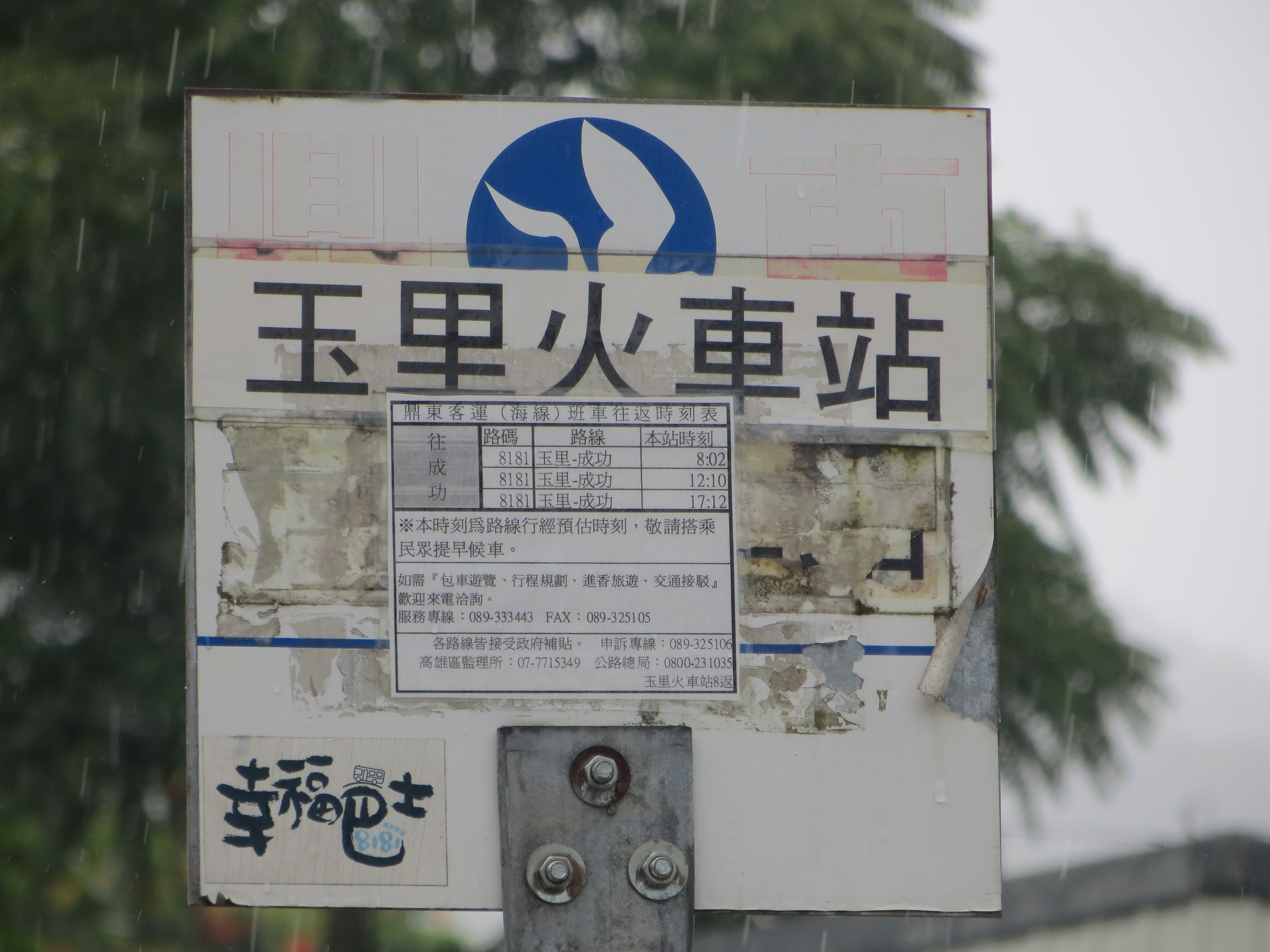 設於臺灣鐵路管理局玉里車站外大同路上的鼎東客運海線營運區「玉里火車站」站牌，此處僅8181路線使用，同時服務玉里、台東、成功；隔大同路即為花蓮客運玉里站。